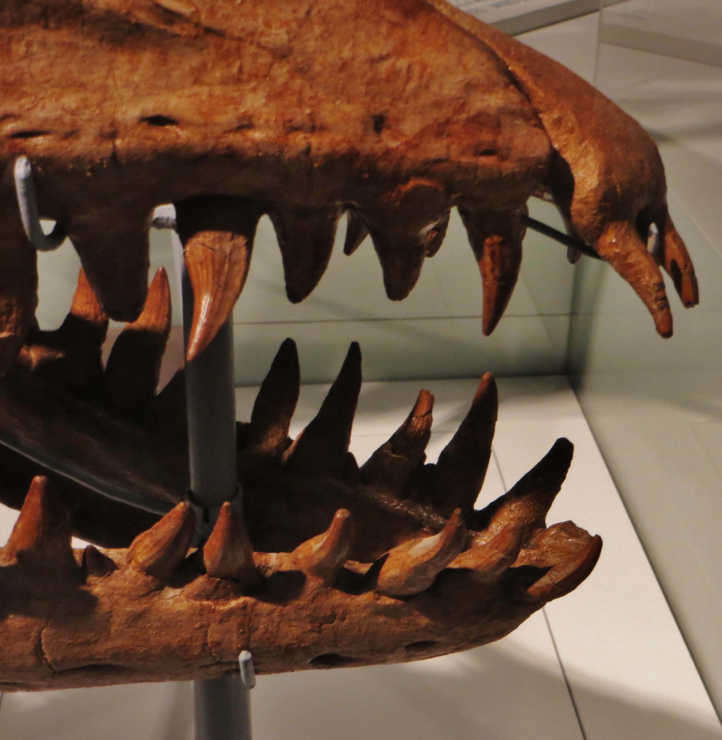 Fossil - Took The picture at Royal Belgian Institute of Natural Sciences, Brussels